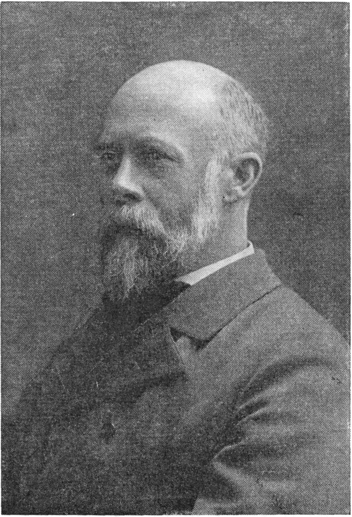 Ivar Mortensson Egnund.